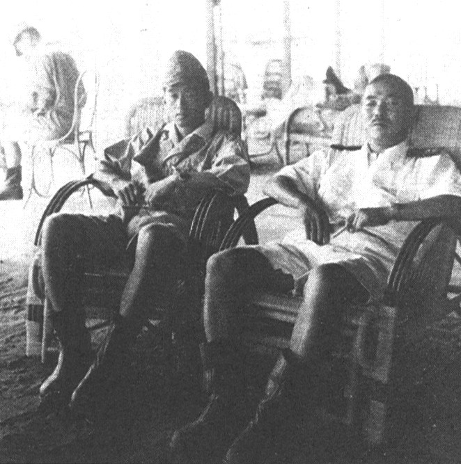 1943年、右：202空司令、岡村基春中佐。左：飛行長、鈴木實少佐。